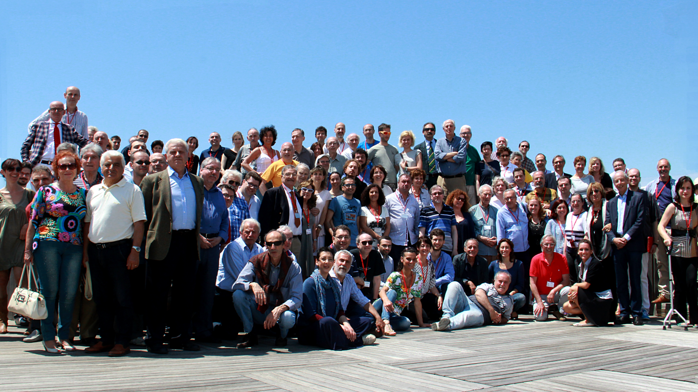 La festa della Sibilla